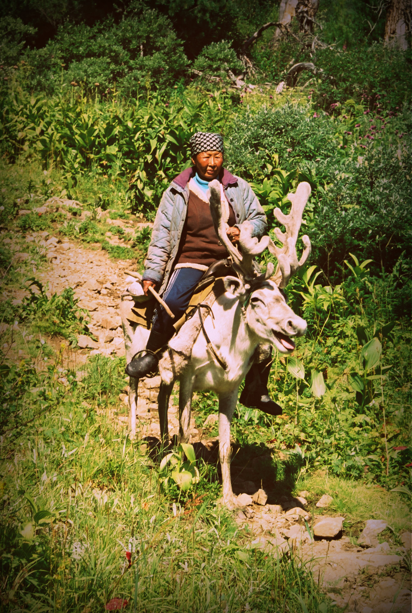 Тувинка на олене. На перевале в районе Жойгана. Окинский район Бурятии, Забайкалье